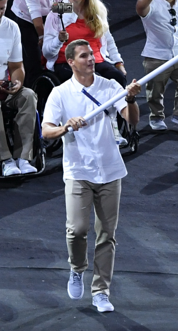 Rio de Janeiro - Cerimônia de abertura dos Jogos Paralímpicos Rio 2016 no Estádio do Maracanã